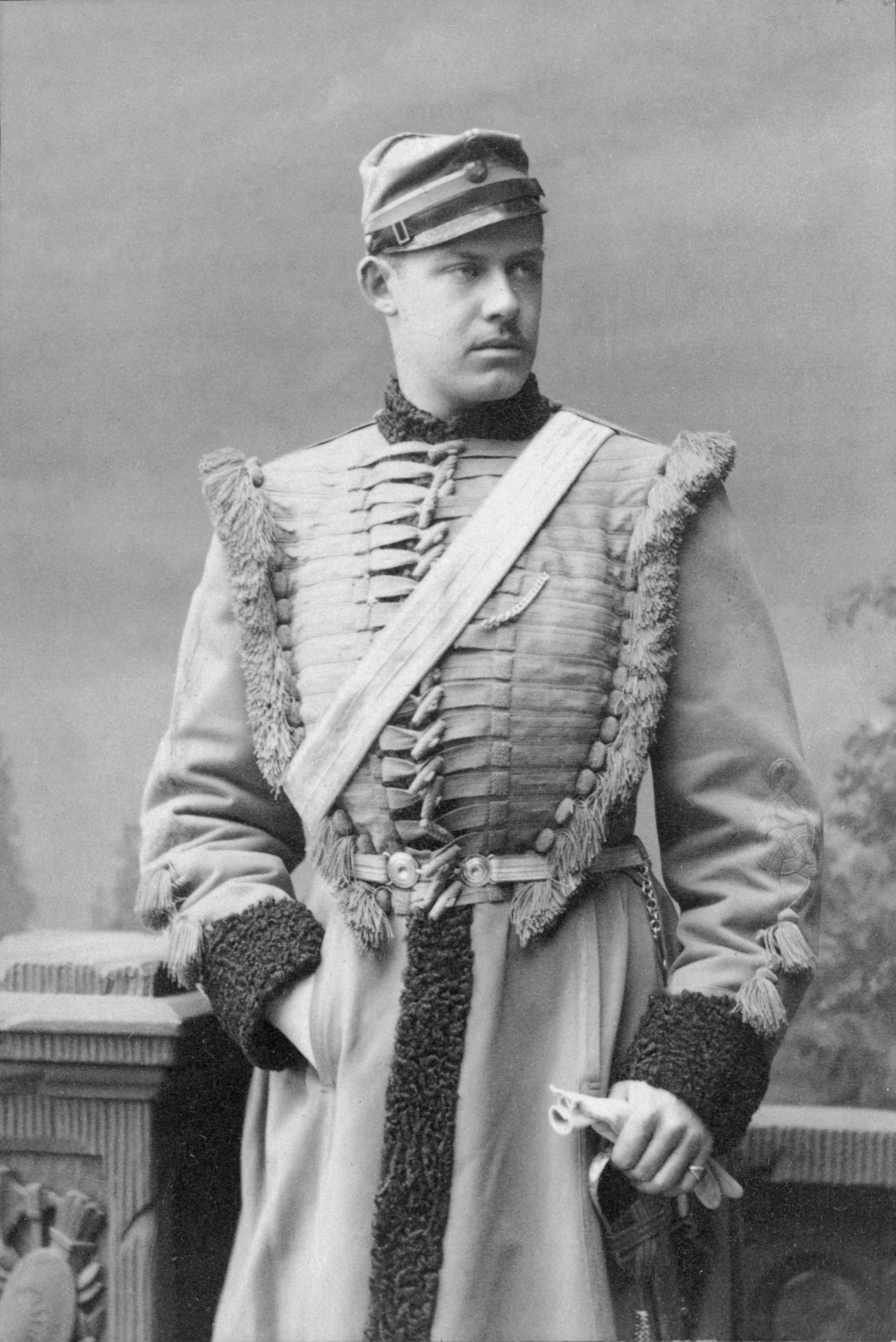 Porträtt av Johan Gabriel Beck-Friis, officer vid Livgardet till häst.